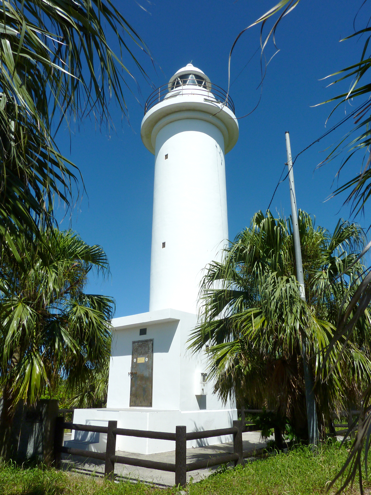 鳩間島灯台（沖縄県八重山郡竹富町鳩間島）